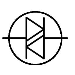 Schematisk symbol för en diac Gjord av: Daniel Ryde, Skövde 2004-08-31 Licens